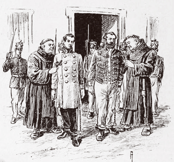 Los Hermanos Luis Carrera y José Luis Carrera camino de ser fusilados en Mendoza, Argentina, 8 de abril de 1818.